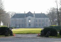 Le château d'Arry